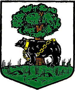 Brasão.